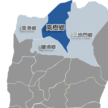 屏東縣高樹鄉相對位置。